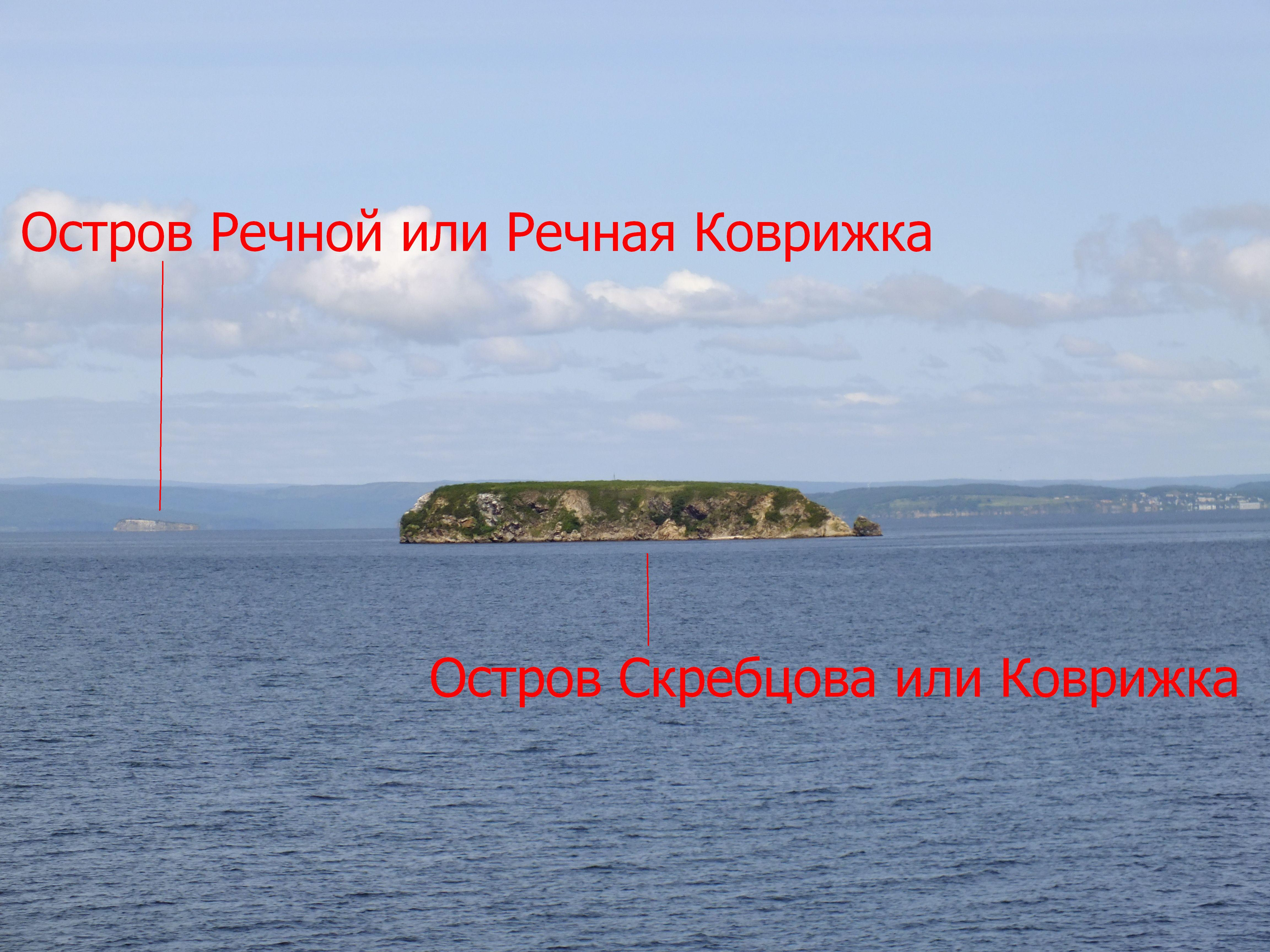 Острова Скребцова и Речной в Амурском заливе